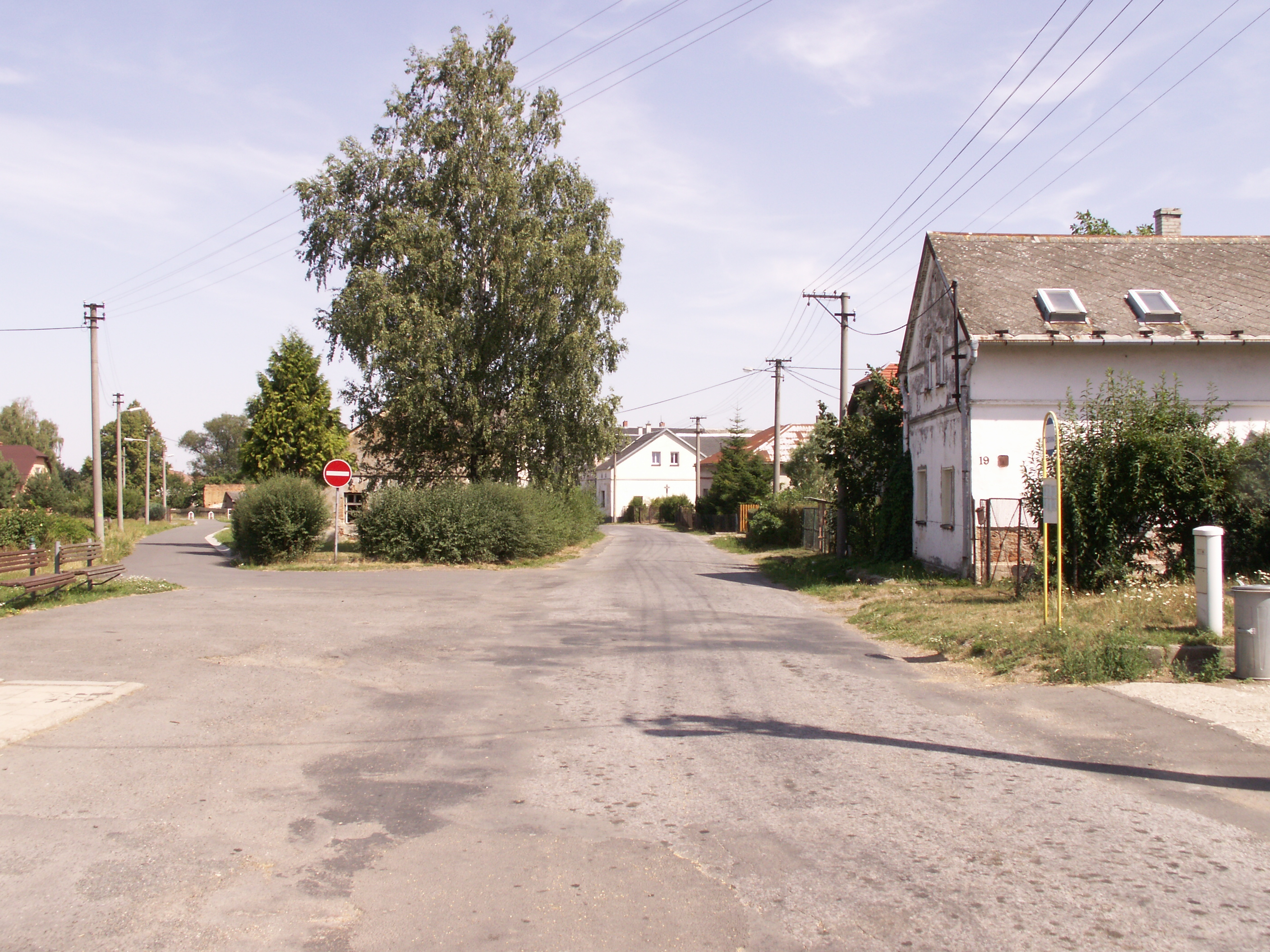 Hlinka, okres Bruntál, kraj Moravskoslezský, střed obce